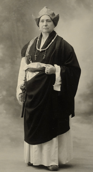 Fotograf ukjent, Reprofotografi Meyer, Elisabeth Portrett av Alexandra David-Neels, Tibet 1933. Bildetekst: Vår tids største kvinnelige oppdagelsesreisende, Alexandra David-Neels. Halskjedet er laget av 108 pannebraskstykker og på høire side sees det omtalte magiske lårben. 16 x 10,7 cm Sølvgelatin. NMFF.003380-3-1